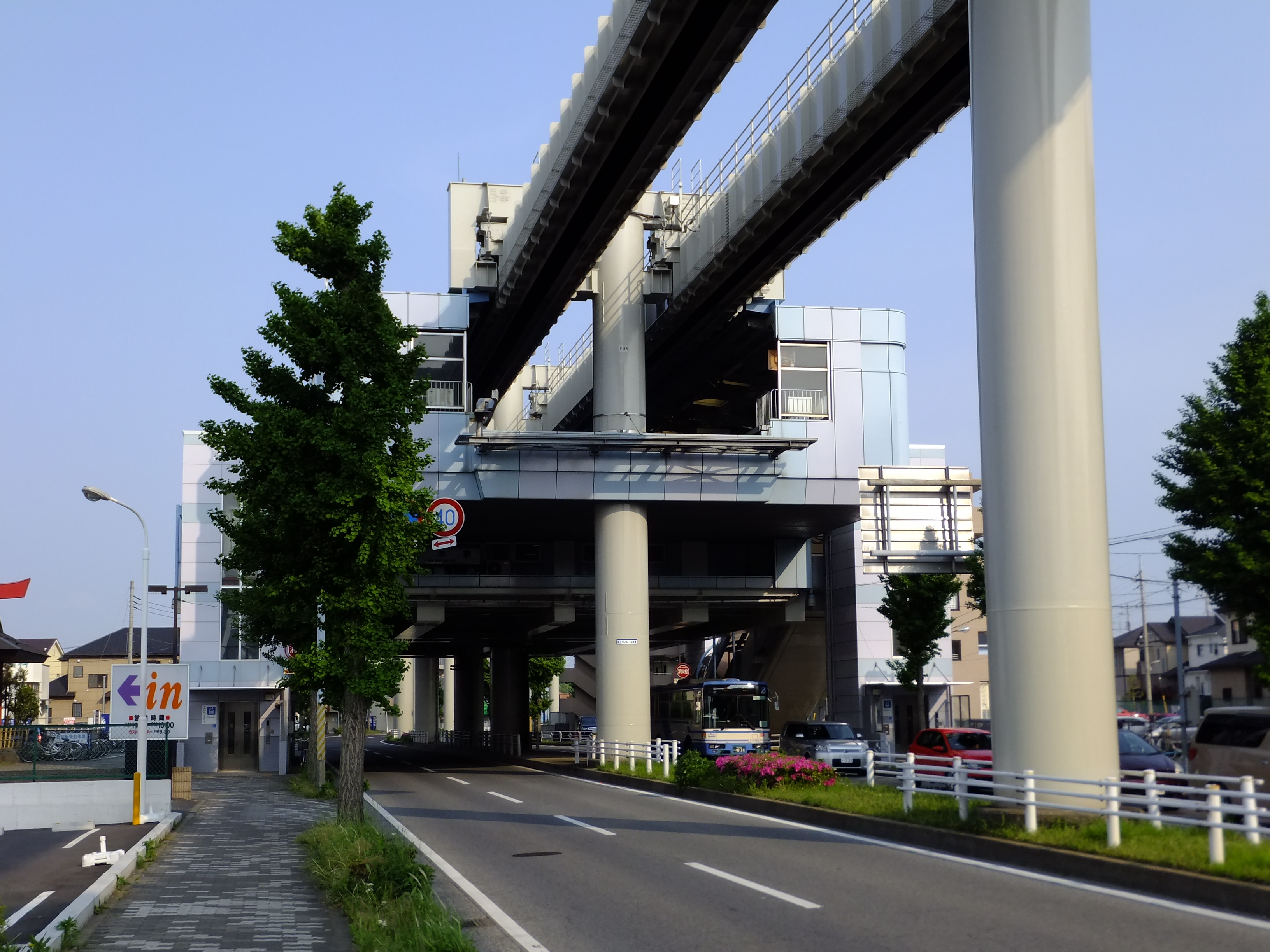 千葉都市モノレール桜木駅